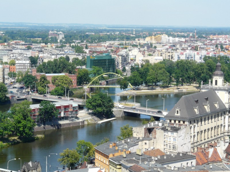 Vratislav - řeka Odra